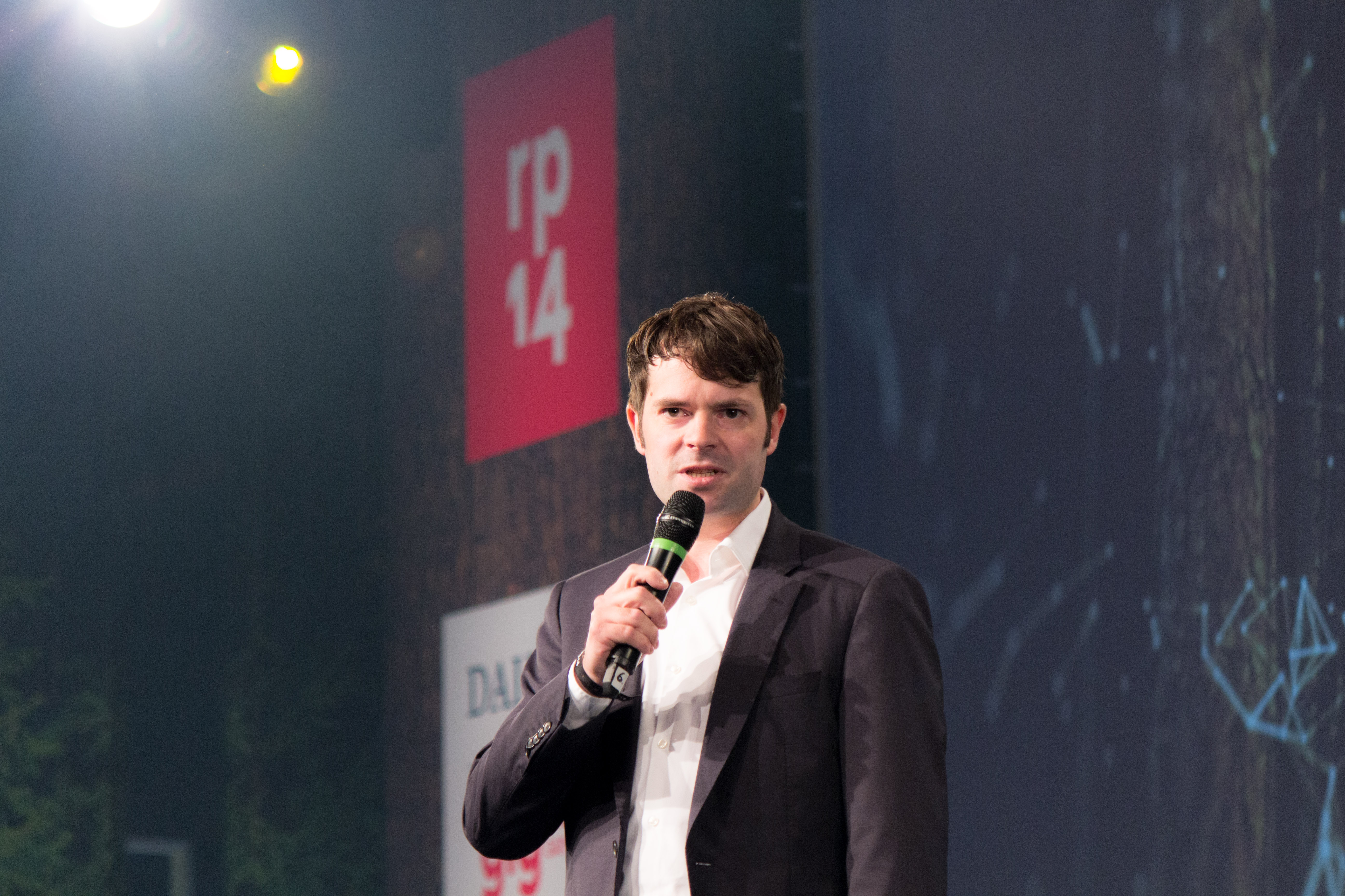 Björn Böhning auf der re:publica 2014